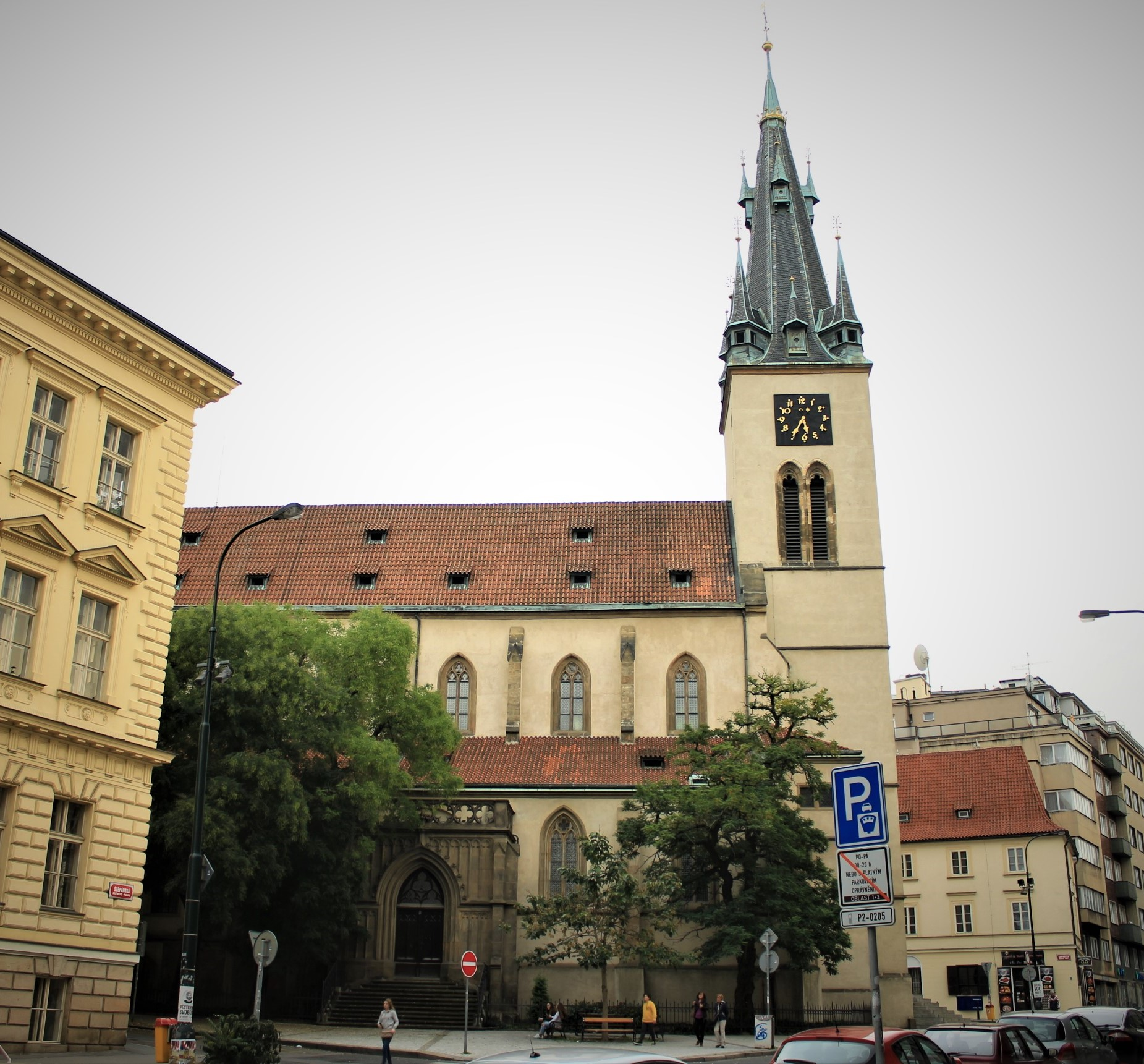 Praha-Nové Město kostel sv. Štěpána